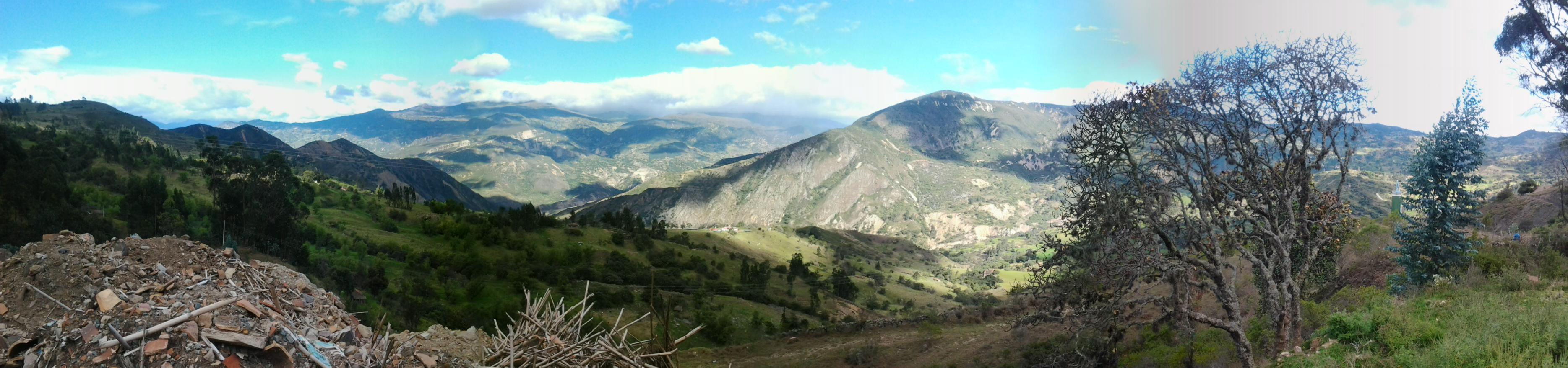 Aspecto general de la zona rural de Sativanorte y el norte del departamento de Boyacá, Colombia.